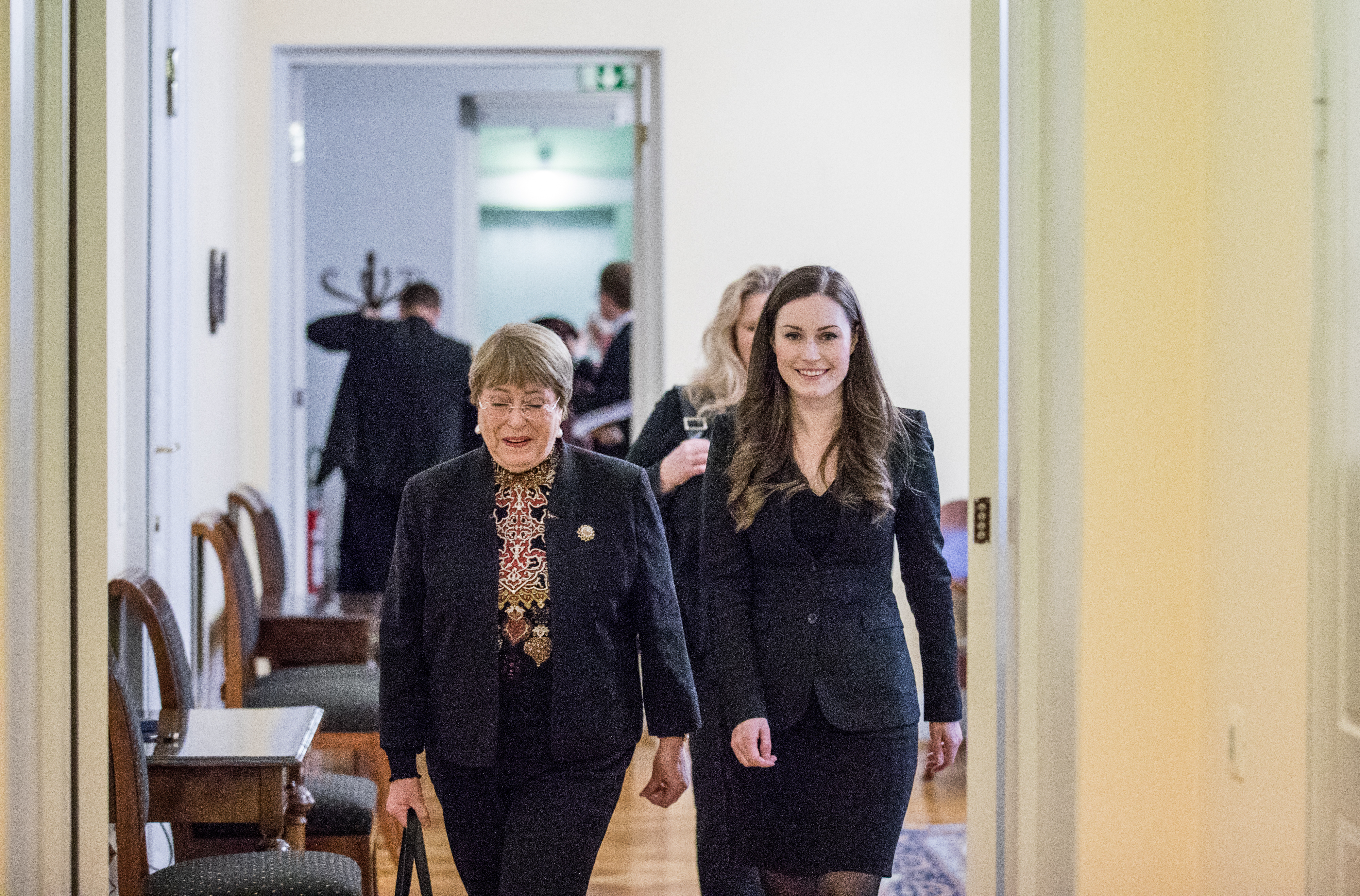 © Laura Kotila | valtioneuvoston kanslia